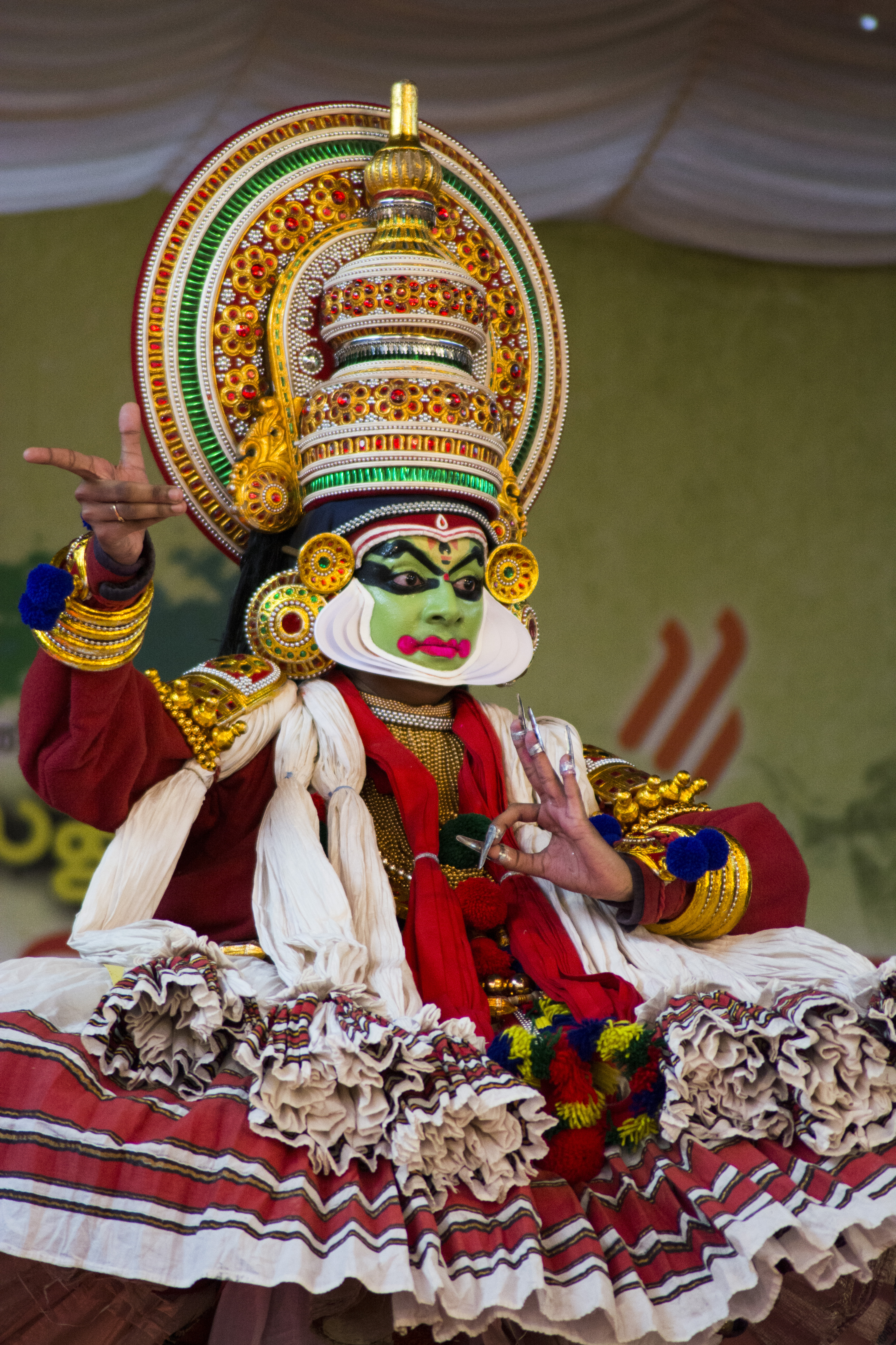 കേരള സ്കൂള്‍ കലോത്സവം 2017 കണ്ണൂര്‍. കഥകളി.